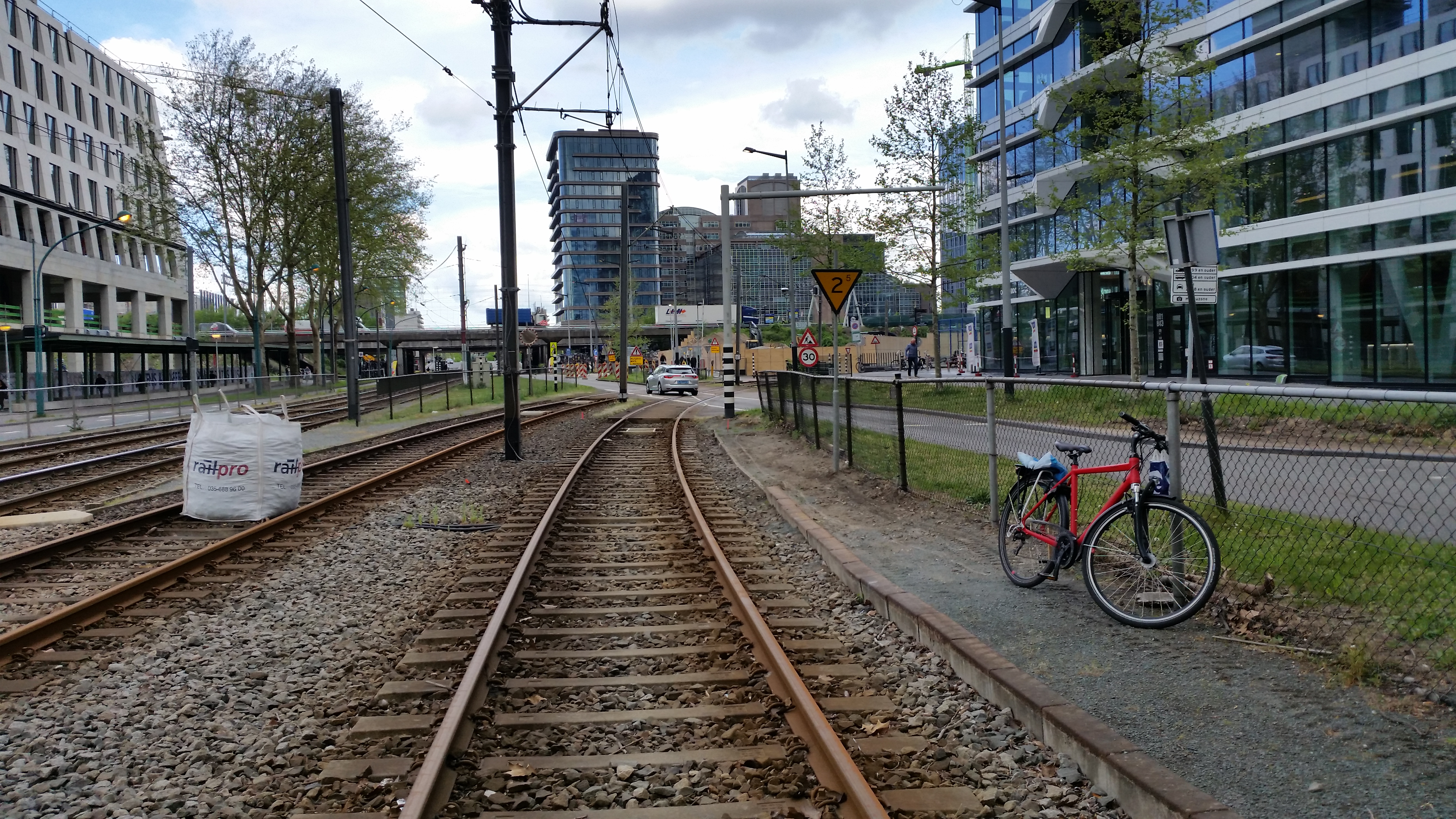 Amstelveenboog naar Brug 1631 (in Amsterdam); al afgesloten